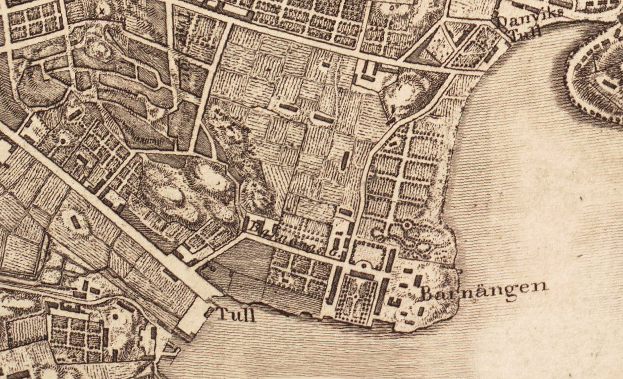 Barnängens fabriker på Södermalm